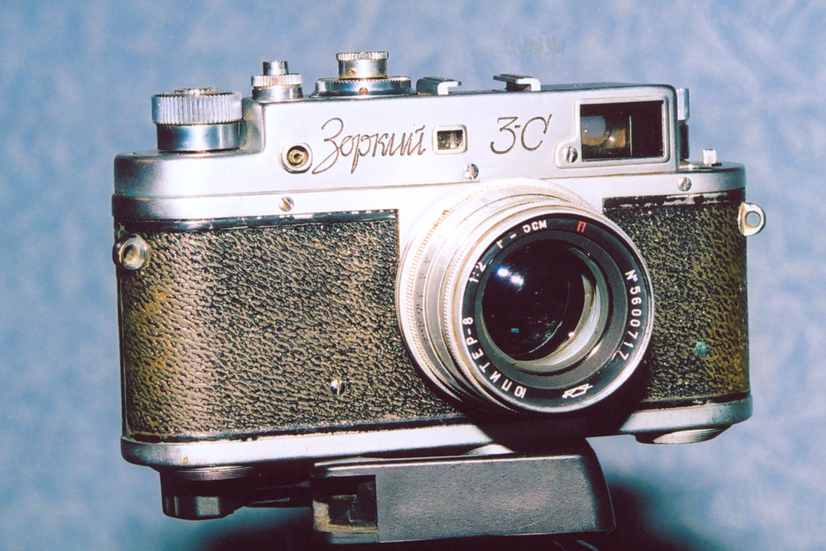 Фотоаппарат Зоркий-3С